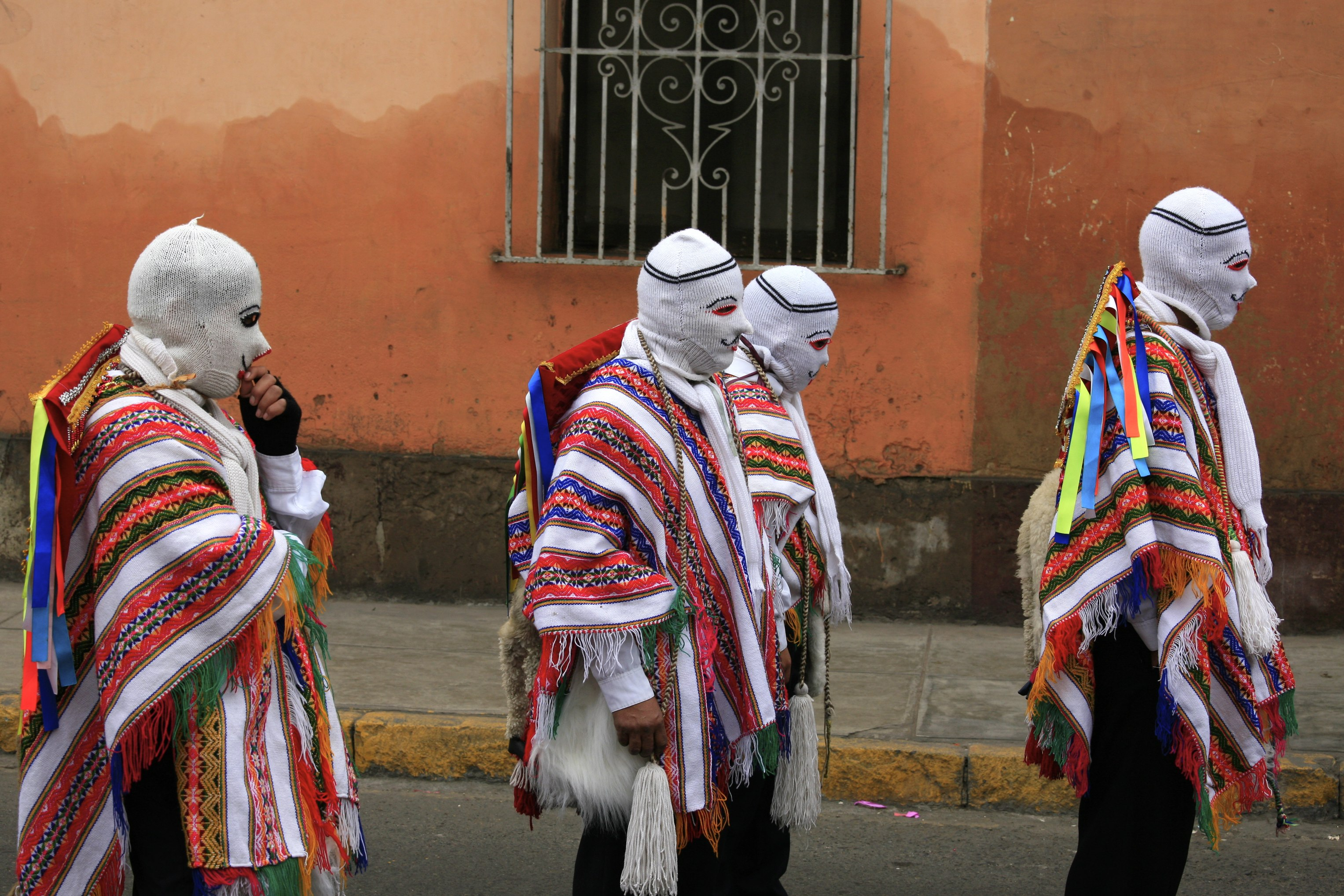 Masked Men